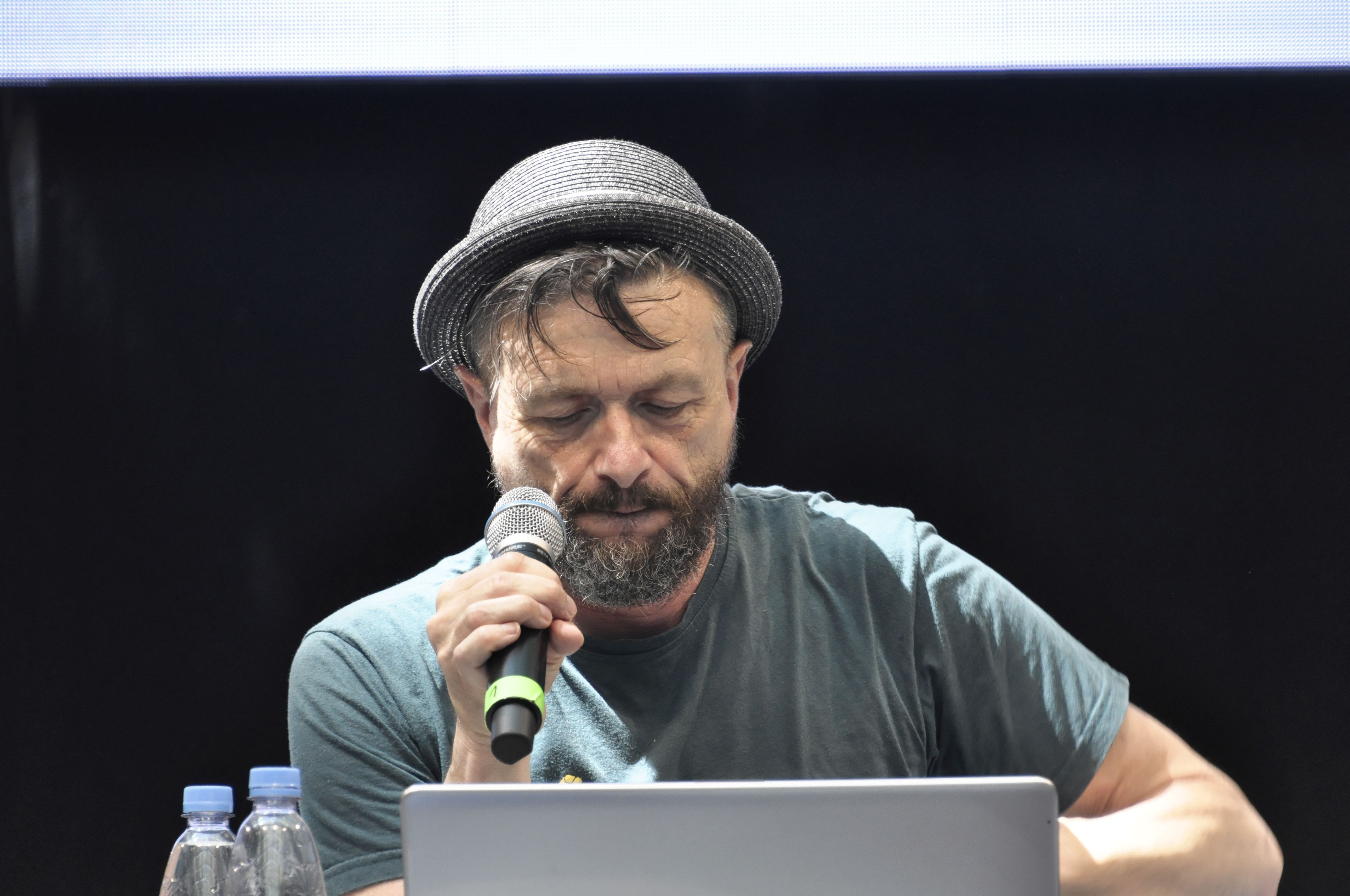 Bilder von der Comic Con Germany 2019 in Stuttgart